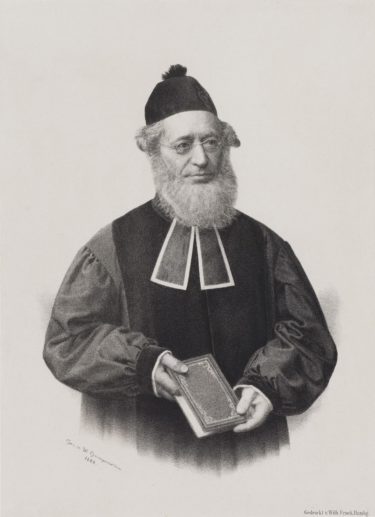 Porträt Anschel Stern (Oberrabbiner von Hamburg) von Friedrich Wilhem Graupenstein